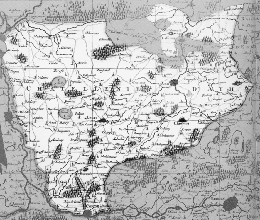 La châtellenie d'Ath dans le Comté de Hainaut (vers 1700). Carte gravée par Alexandre Penez